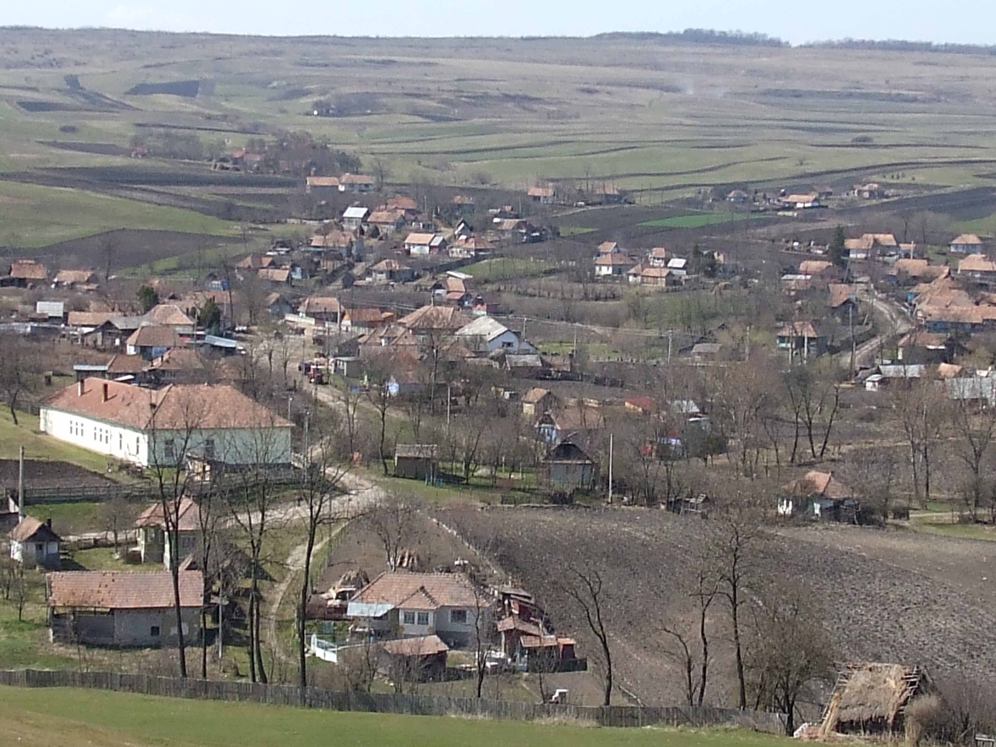 Inagini din Aruncuta,Cluj